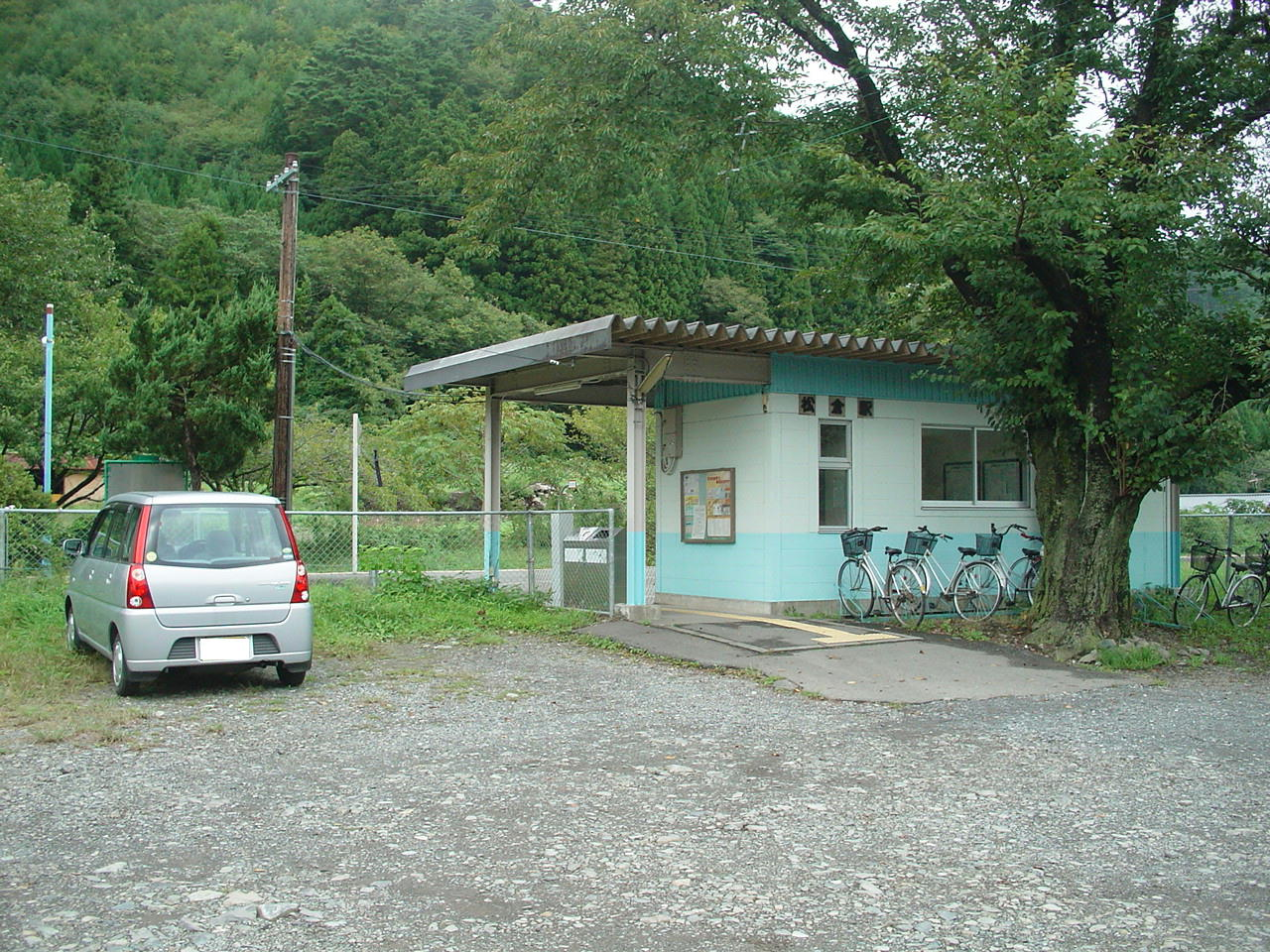 （松倉駅）